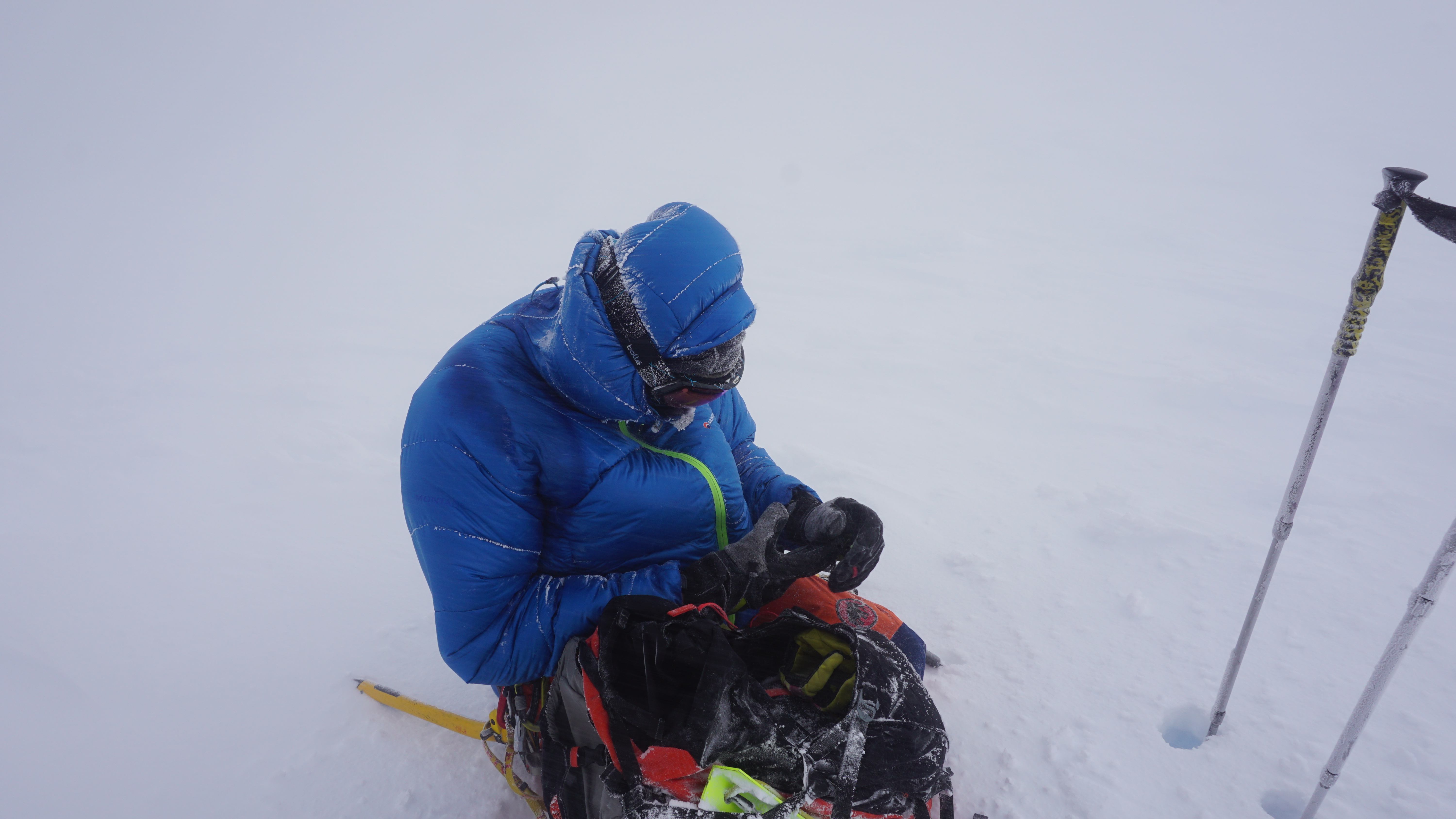 Симеон